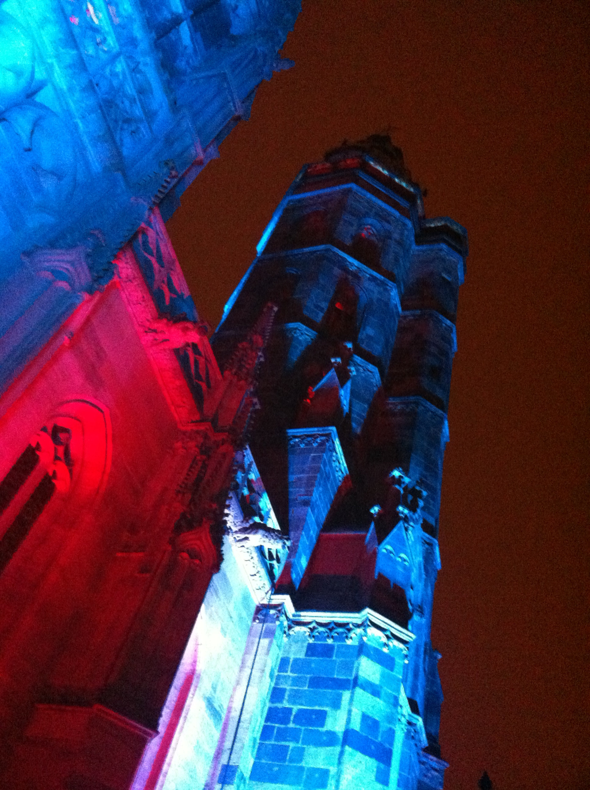 Nasvietenie Dómu počas otváracieho ceremoniálu EHMK 1/2013